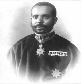 Ras Immirù, uno dei capi principali dell'Impero etiope durante l'invasione italiana